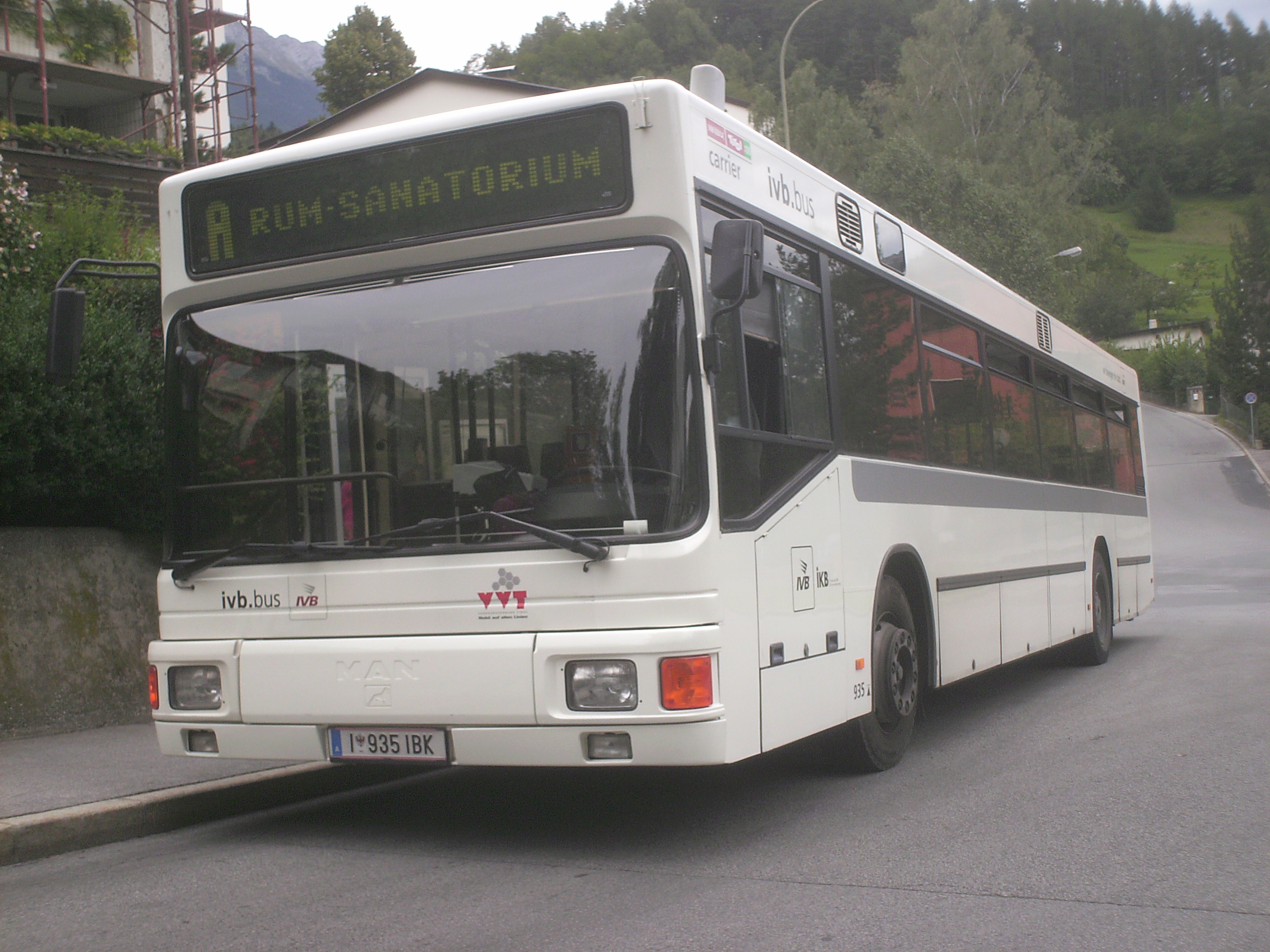 Wagen 935, der letzte MAN NL 202 der Innsbrucker Verkehrsbetriebean der Endhaltestelle "Sadrach" der Linie "A"